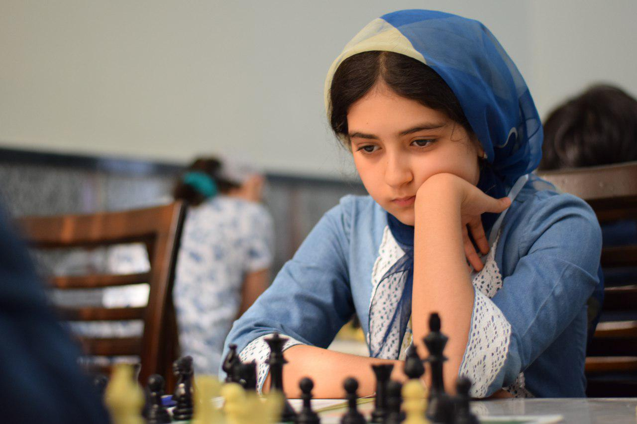 مسابقات کشوری (ساری)